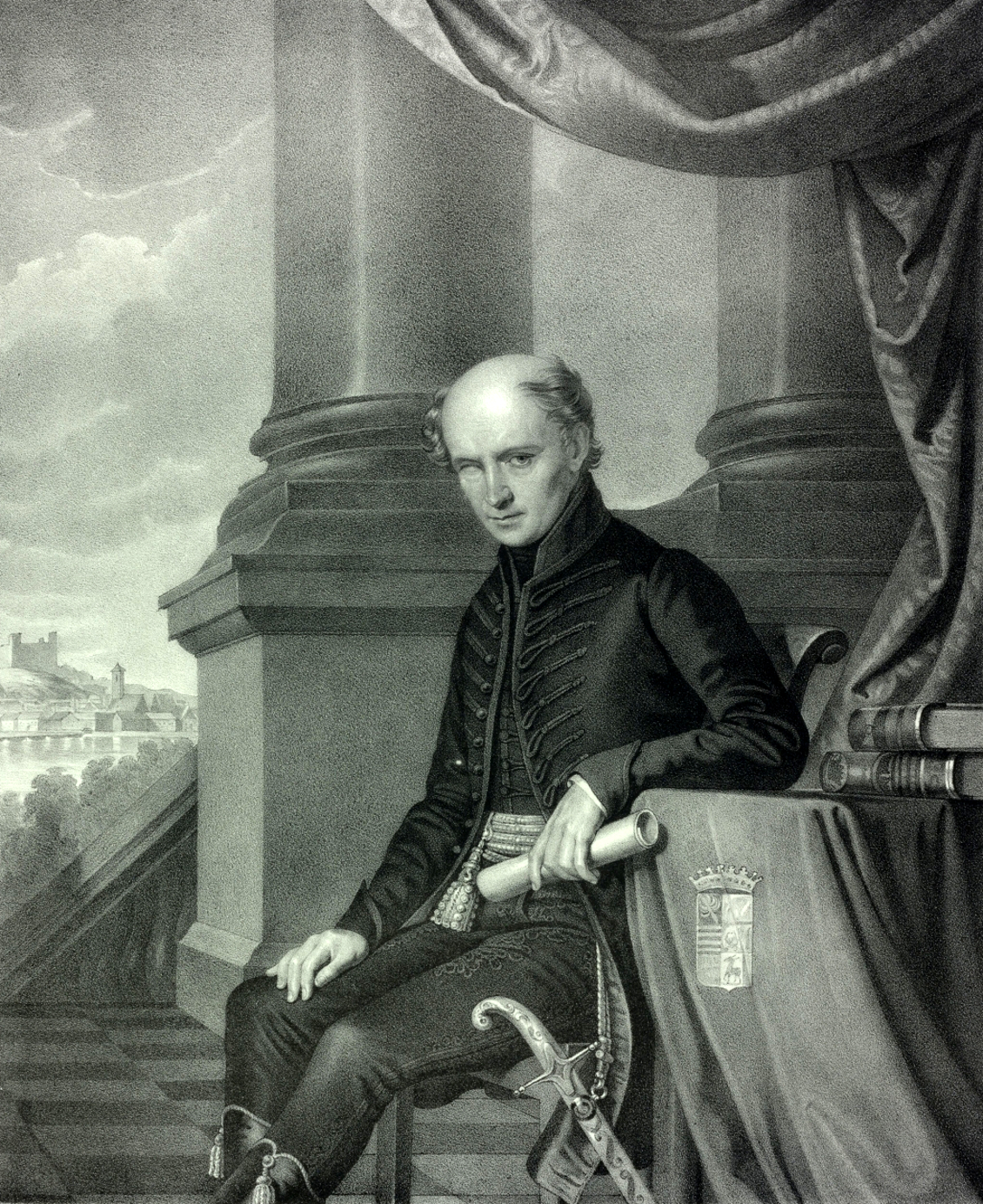 Franz von Kölcsey (1790-1838), Philosoph und Schriftsteller. Lithographie von Franz Eybl.